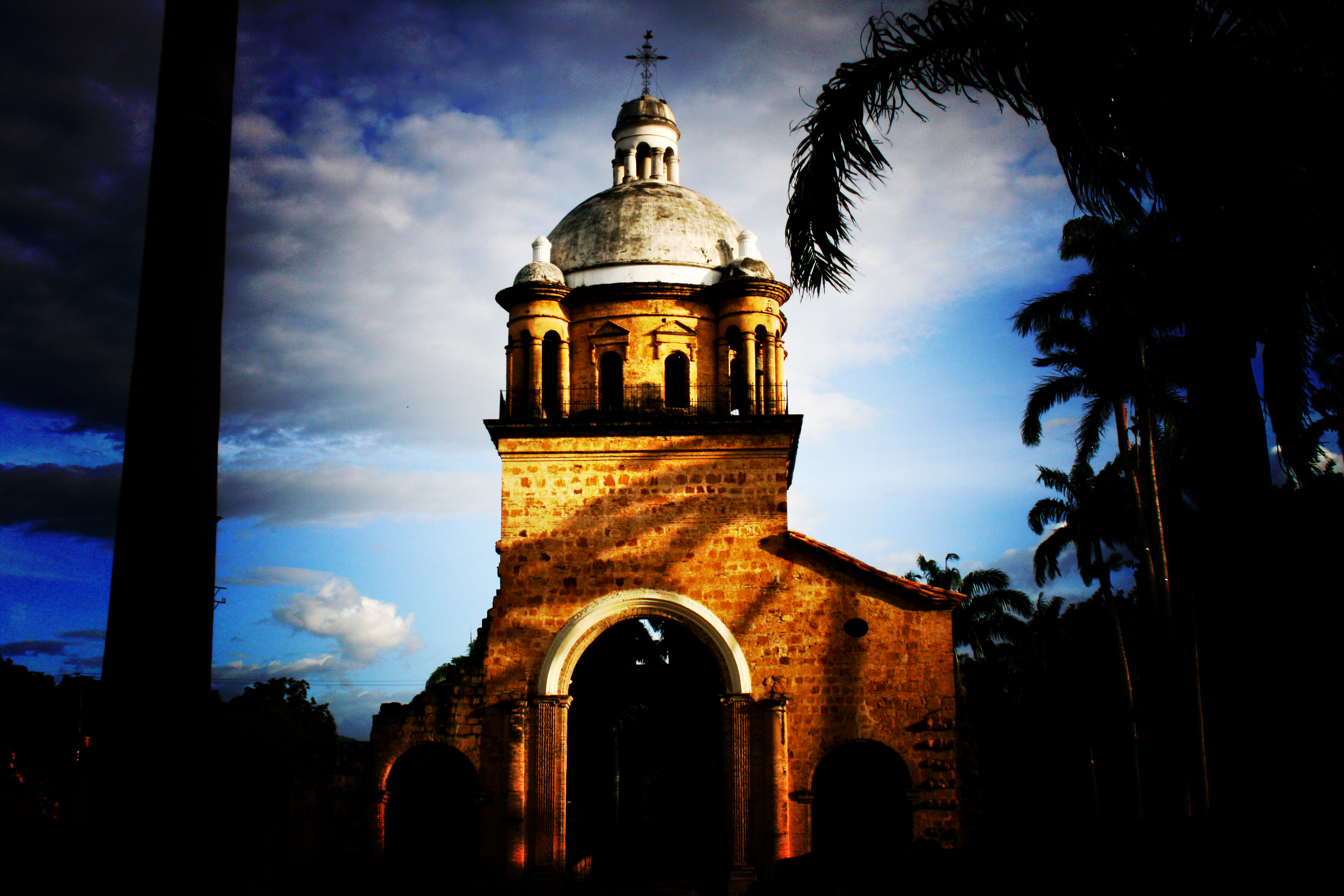 Templo Historico Villa del Rosario